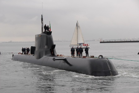 Submarino NRP Arpão